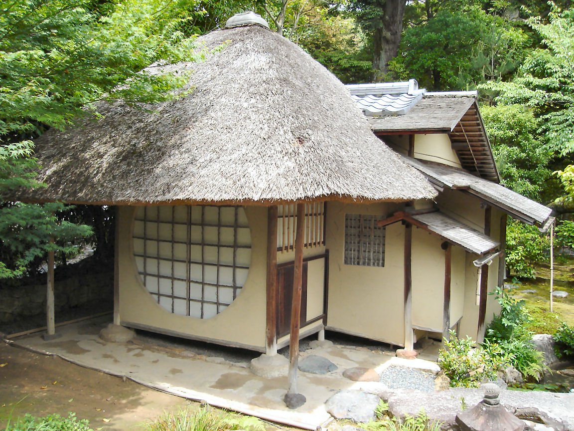 Kodaiji Ihoan